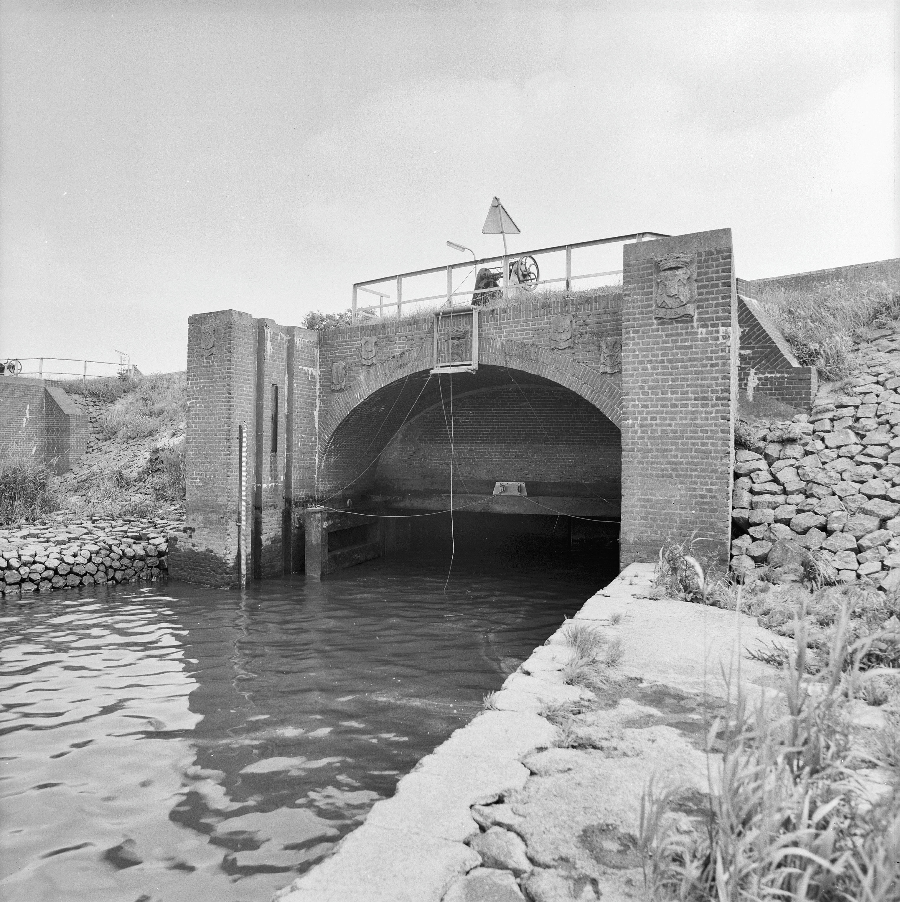 Sluizen: sluis D, rivierzijde